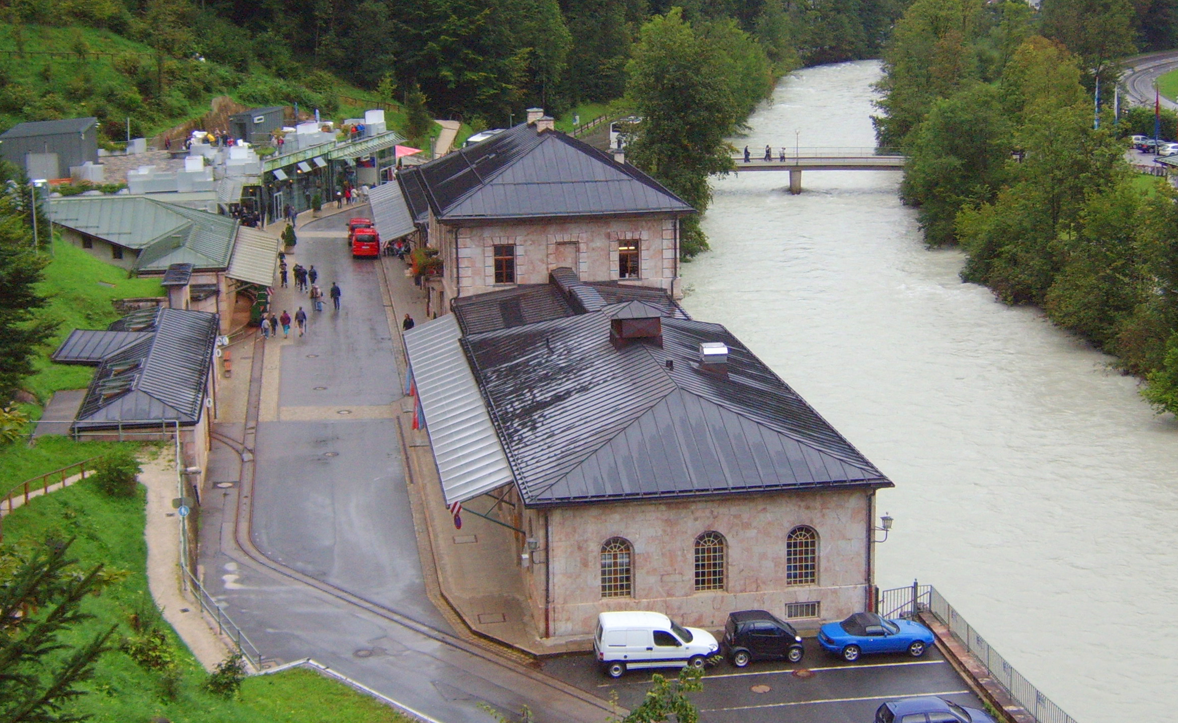 Gelände des Besucherbergwerks in Berchtesgaden